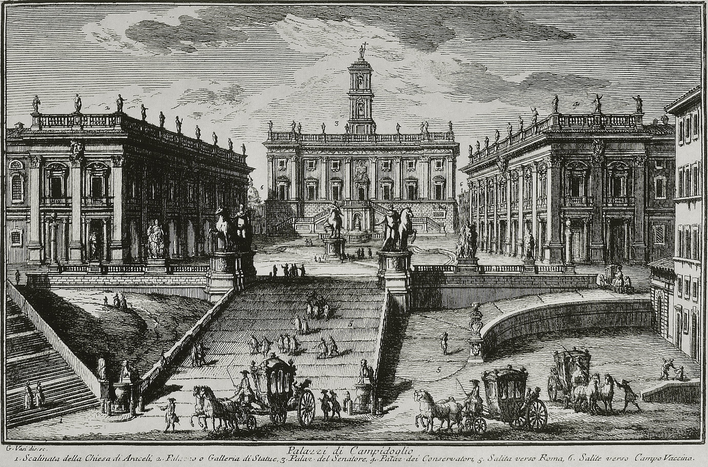 Place du Capitole à Rome